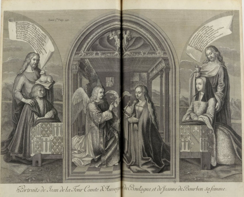 Jan III. z Auvergne s chotí Johanou